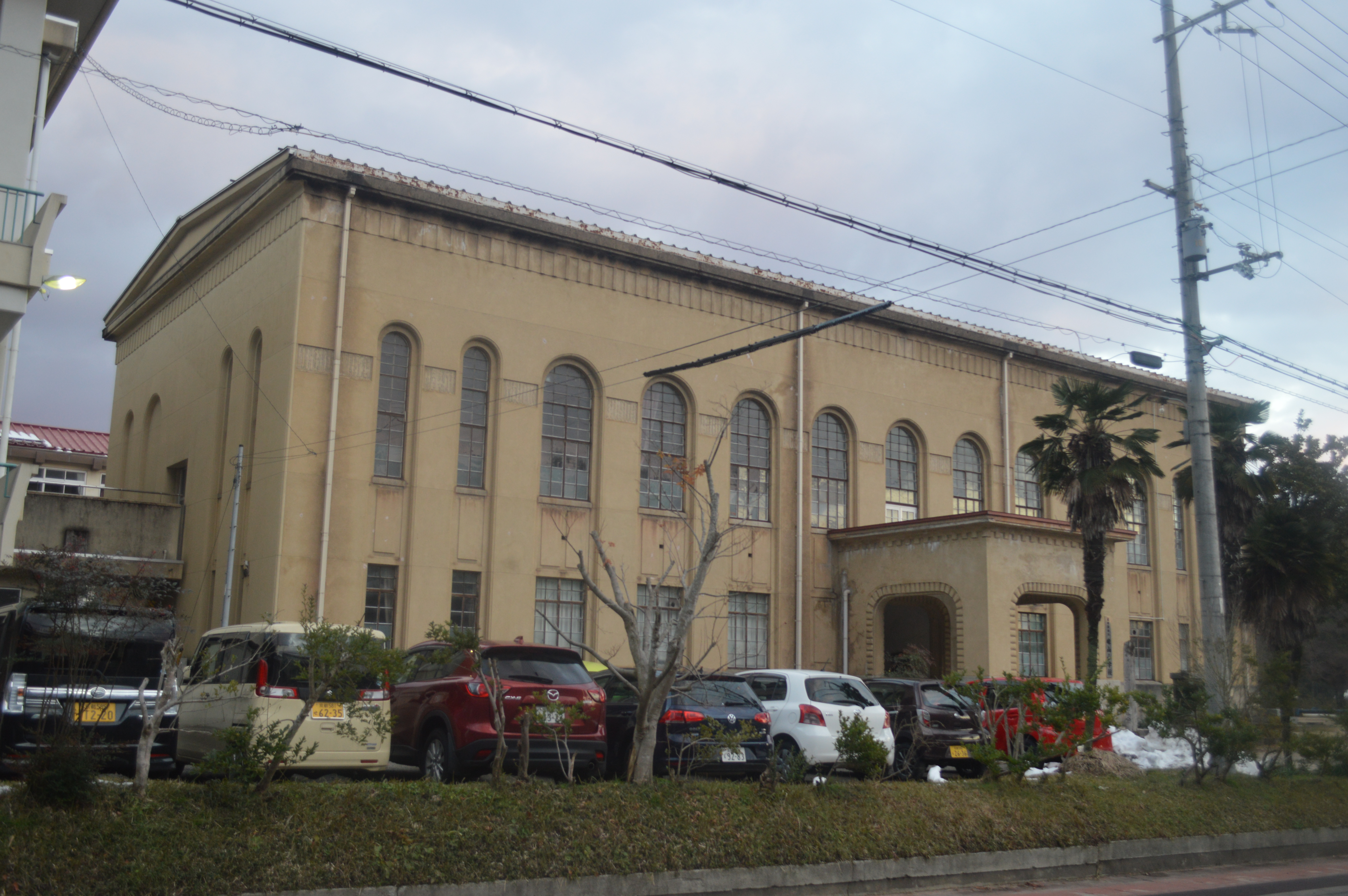 京丹後市立峰山小学校にある峰山小学校本館。